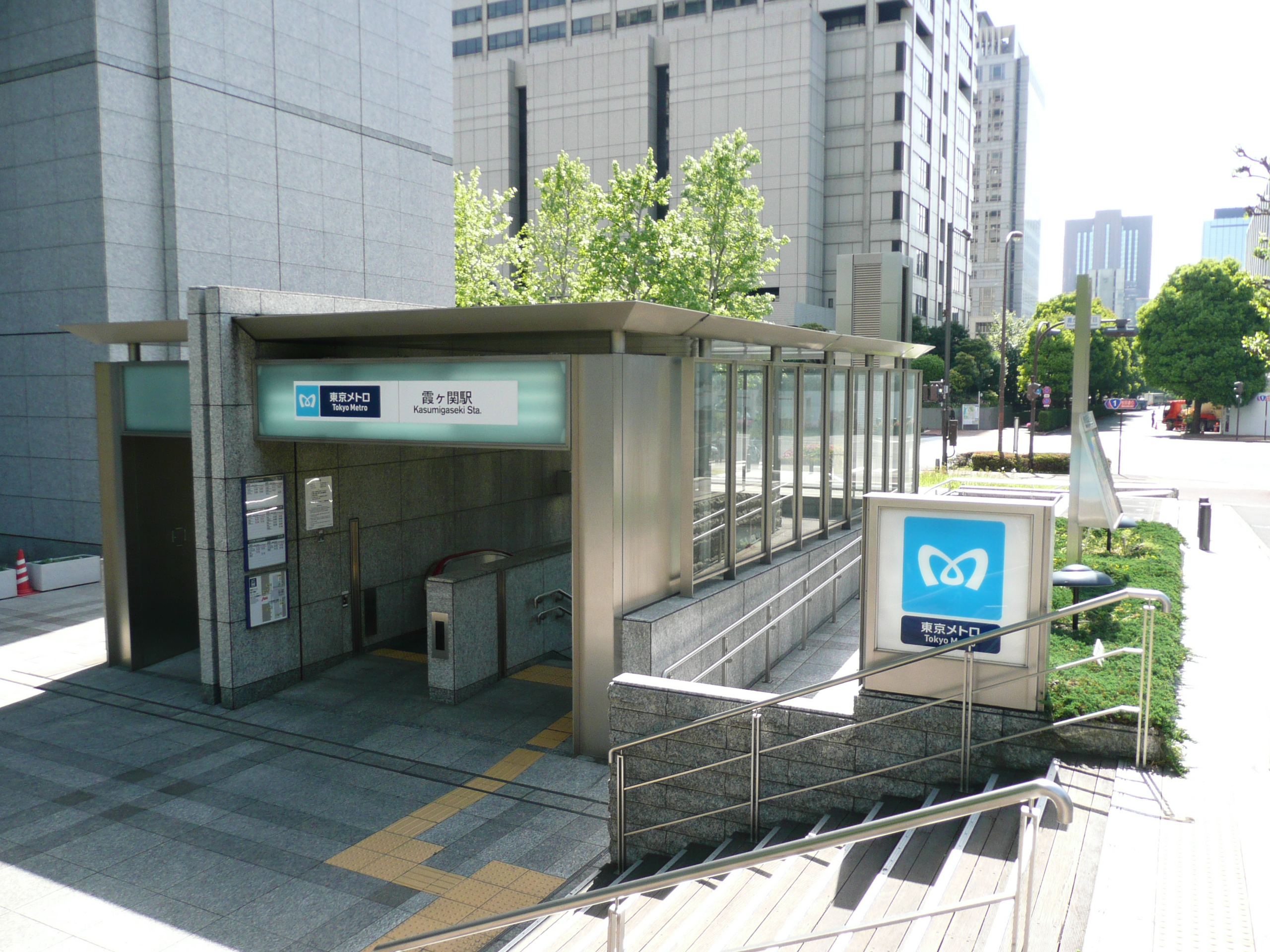 霞ヶ関駅A3a出入口